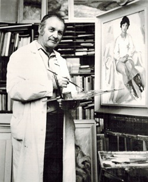 Akademický malíř Jaromír Fajkus maluje